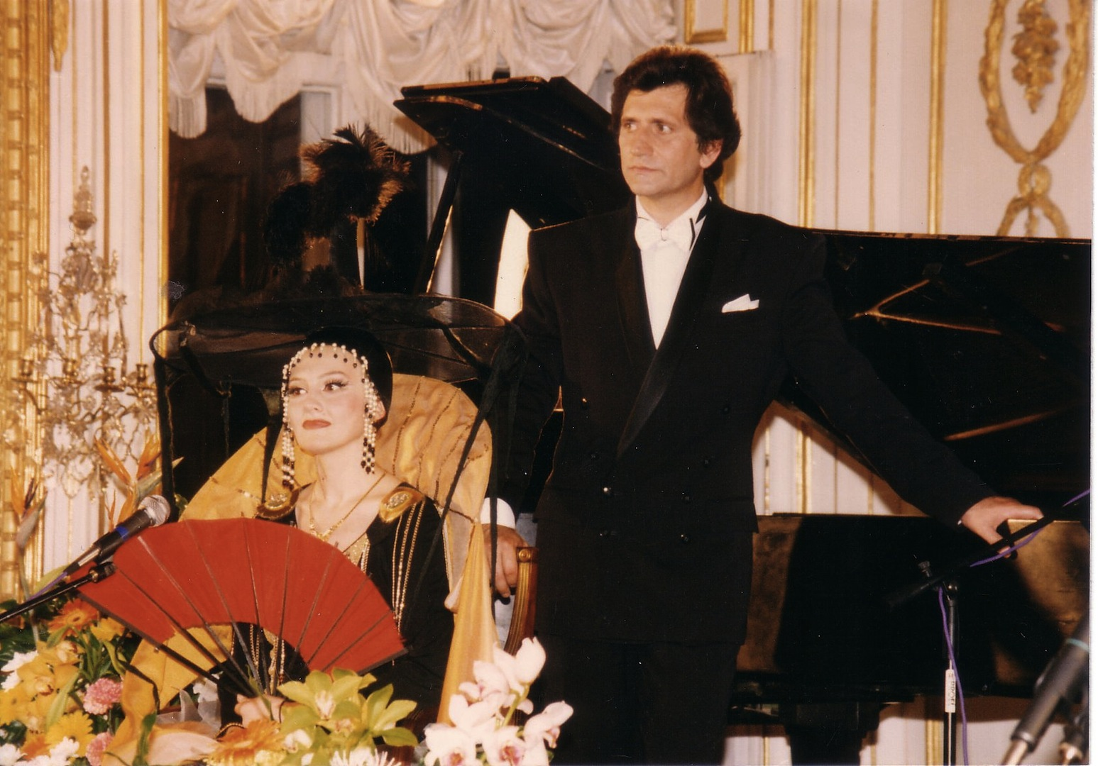 Ведущие премии "Хрустальная турандот" - Марина Есипенко и Евгений Князев